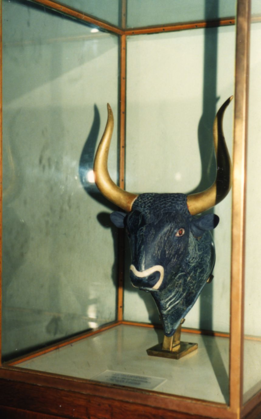 Bull from Creta, Minoan civilization